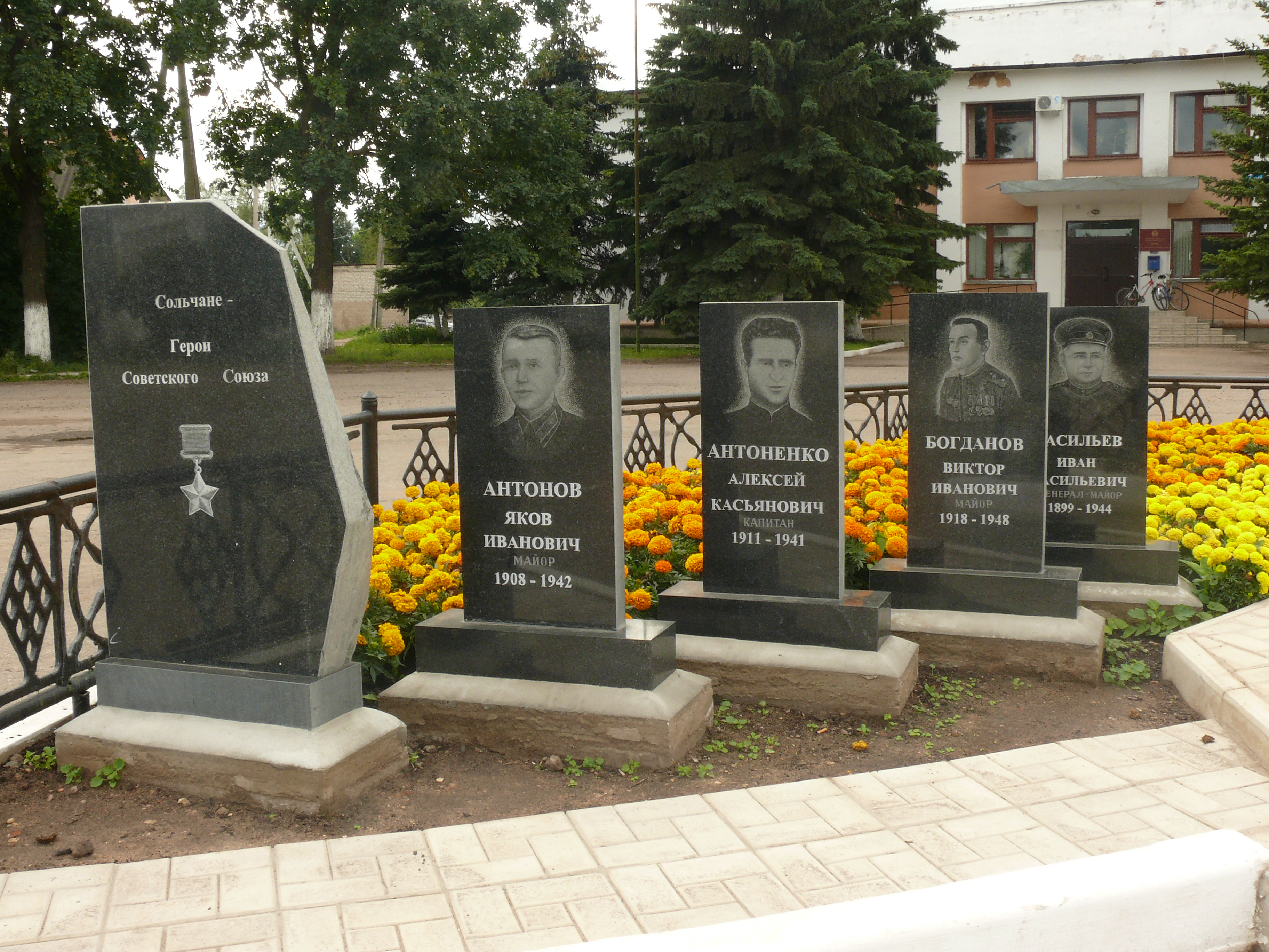 Памятник героям-сольчанам. Город Сольцы, Новгородская область